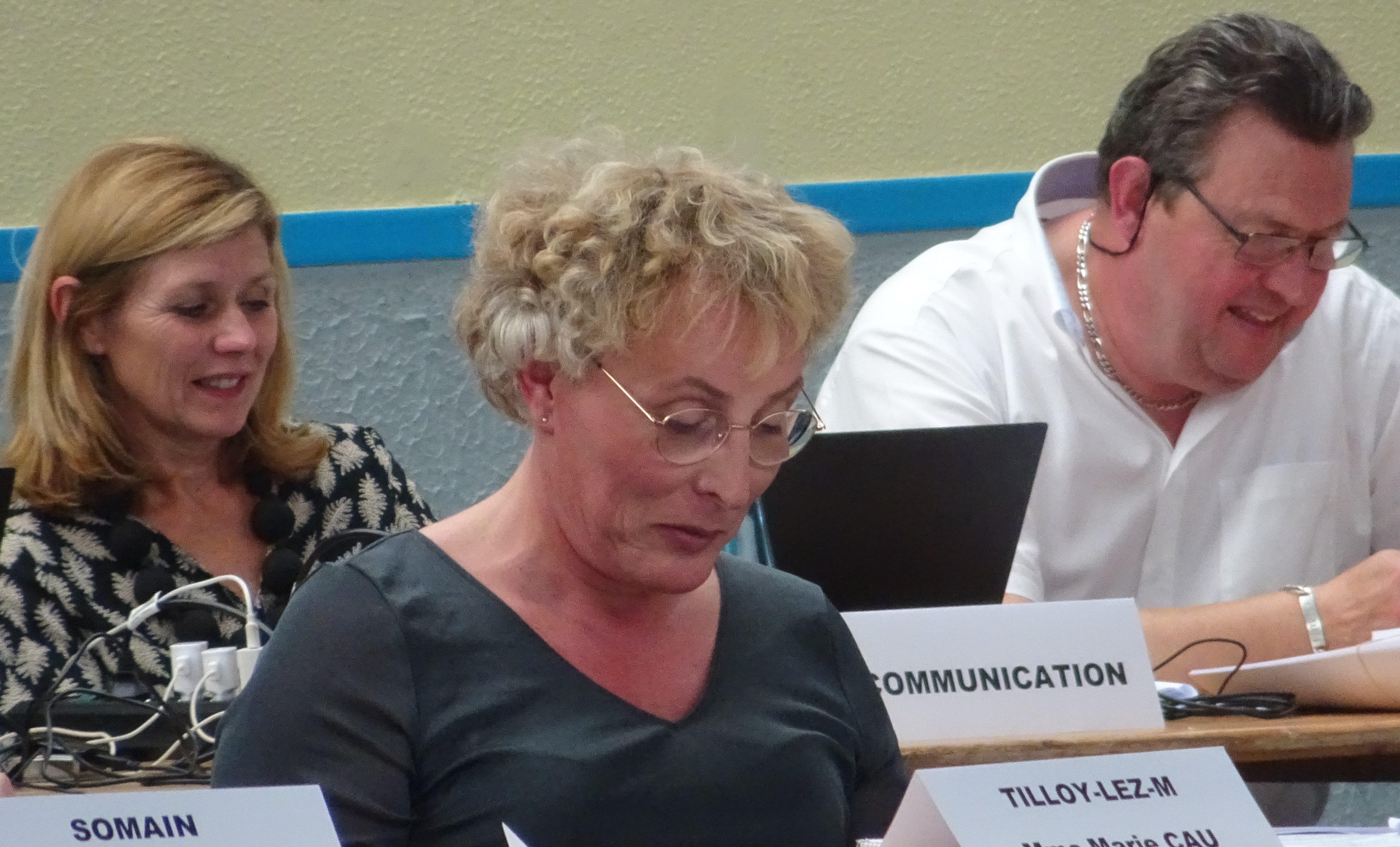 Marie Cau, Maire de Tilloy-Lez-Marchiennes, lors de la séance d'investiture de la Communauté de Communes de Cœur d' Ostrevent en la salle Coquelet d' Auberchicourt le 10 juillet 2020. Depicted person: Marie Cau – French politician